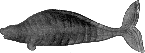 zeitgenössische Zeichnung der Stellerschen Seekuh. The image is thought to be a copy of an earlier image.[1]